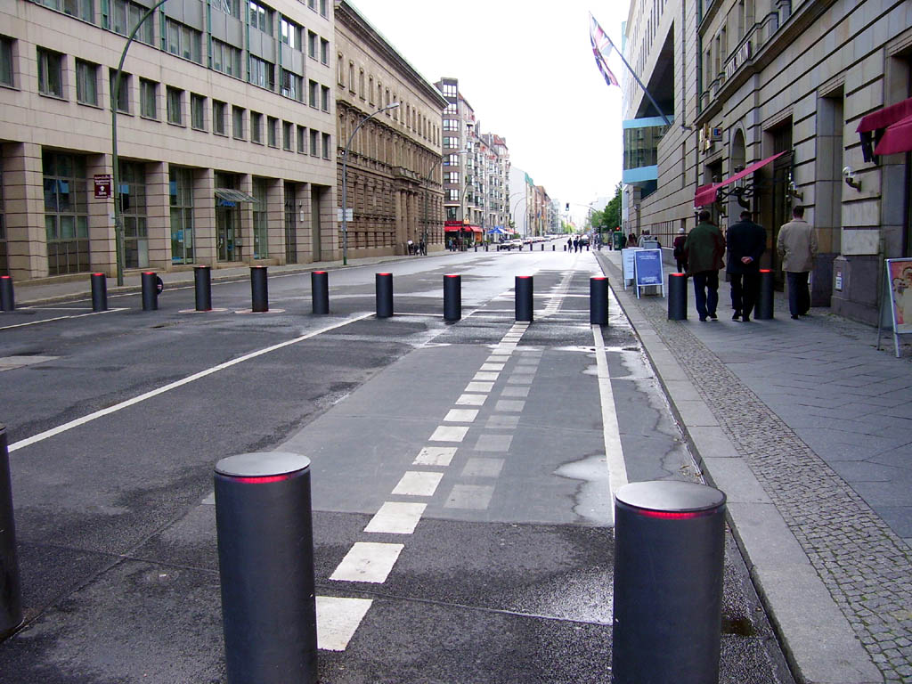 Die Wilhelmstraße in Berlin gesehen von Unter den Linden. Im Vordergrund ist eine Absperrung aufgrund der Britischen Botschaft.